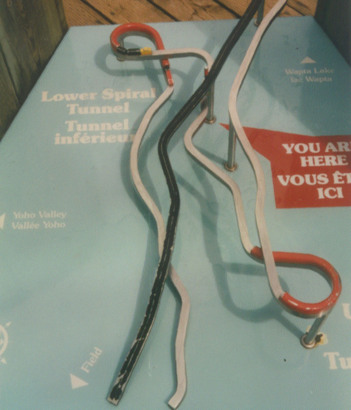 Eisenbahn westlich des Kicking Horse Passes über die Rocky Mountains in Kanada; Modell der Streckenführung mit 2 Kehrtunnels (rot: “Spiral Tunnel”; schwarz: alte Strecke vor dem Bau der weniger steilen neuen Strecke mit den beiden Tunnels)